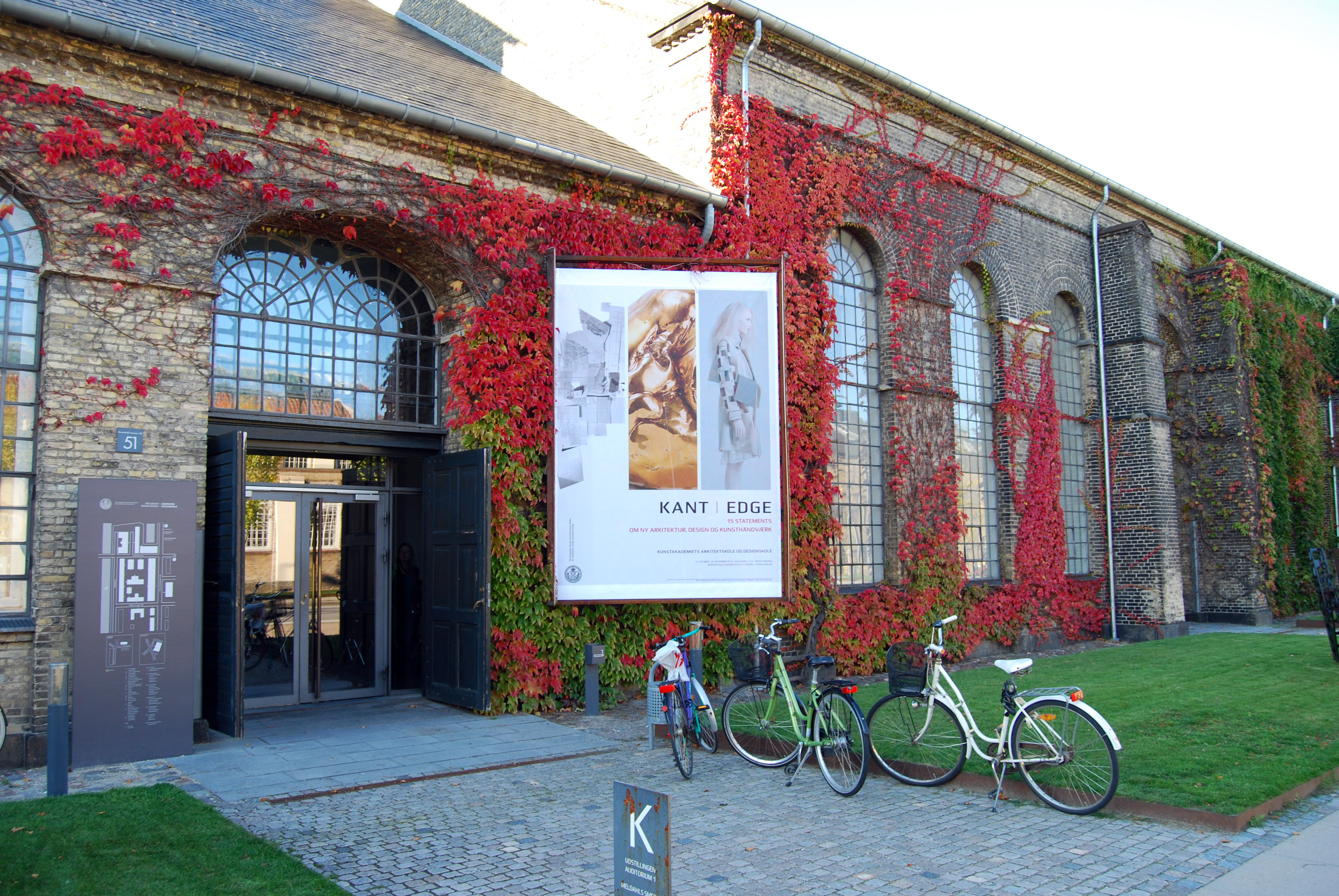 Udstilling: KANT / EDGE. Udvalgte Afgange 2012, exhibition at Danmarks Designskole at Holmen in Copenhagen, Denmark